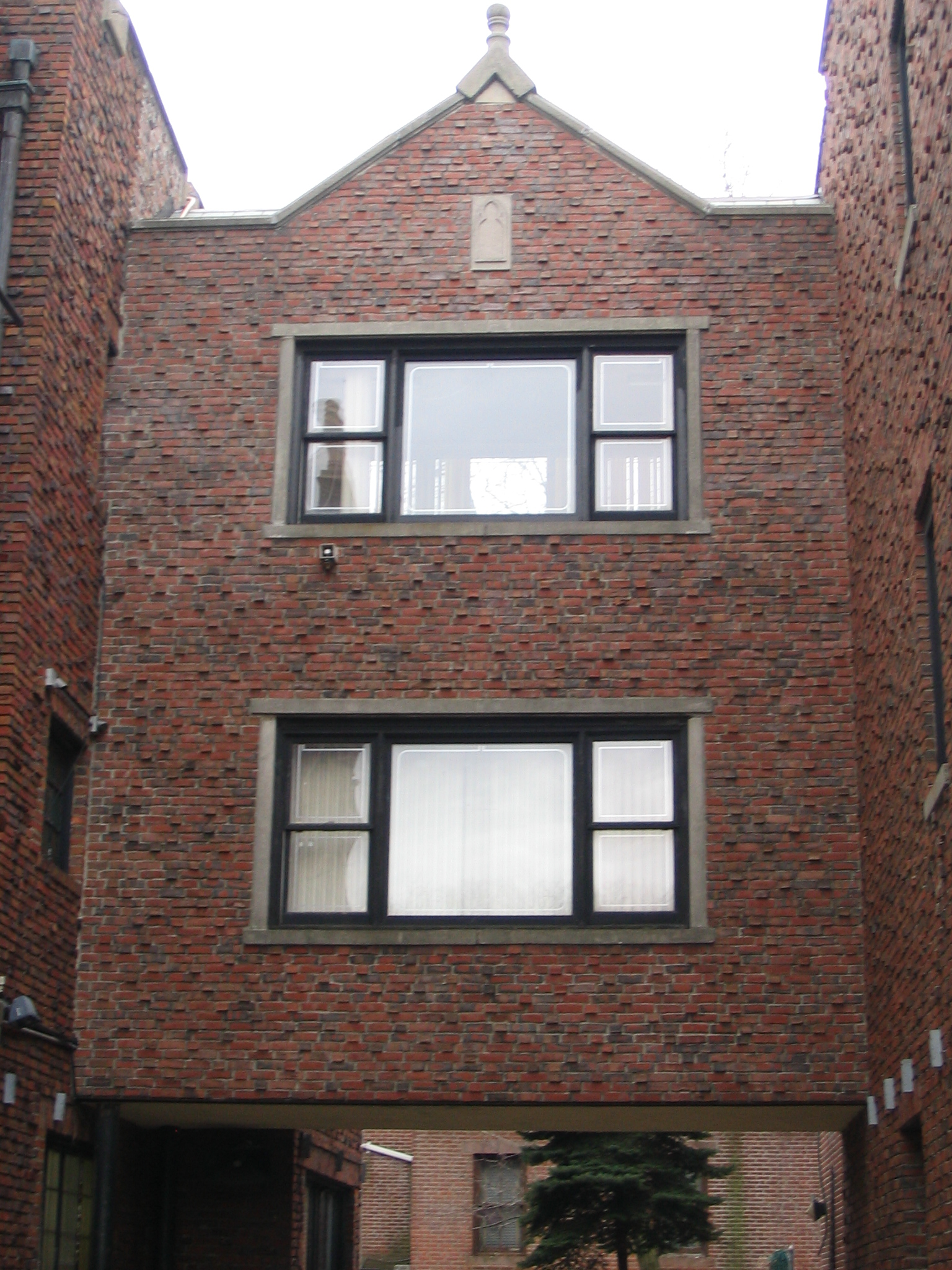 גשר המחבר בין he:מרכז חב"ד העולמי - 770 לספריית אגודת חסידי חב"ד